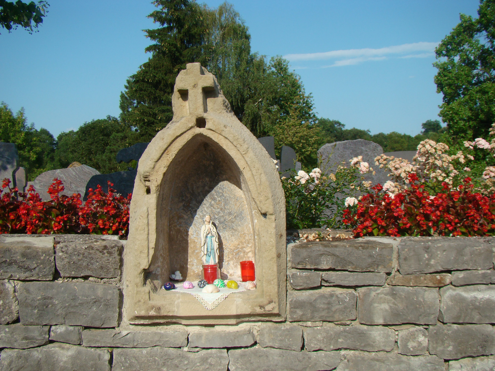 Gotische Nische der ehem. Kirche St. Wendelin in Herbolzheim, dort vermauert in der Friedhofsmauer am Platz der ehemaligen Kirche